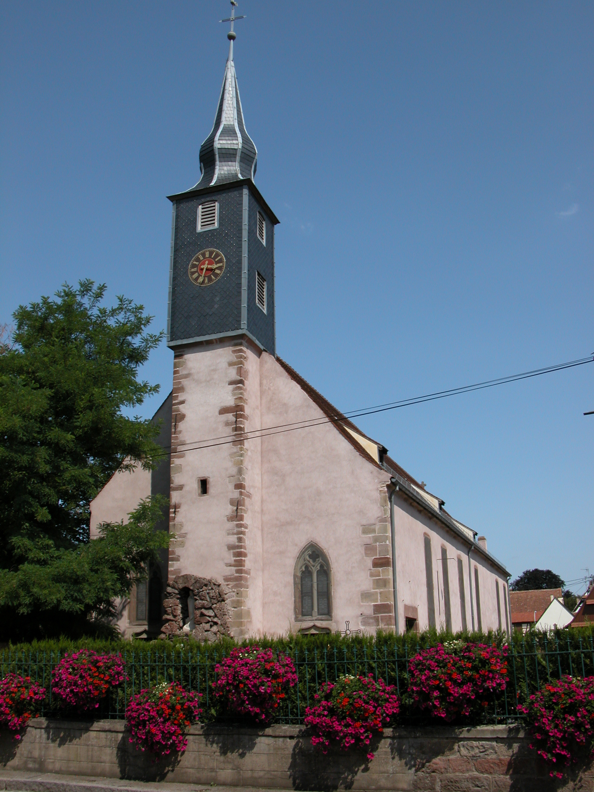 eglise st martin, Dachstein, Bas-Rhin